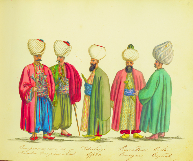 Jenisaires au service des Ministres Europeens a Const. Tharbadgi (Officier). Bairatdser (Enseigne). Ousta ( Caporal).jpg